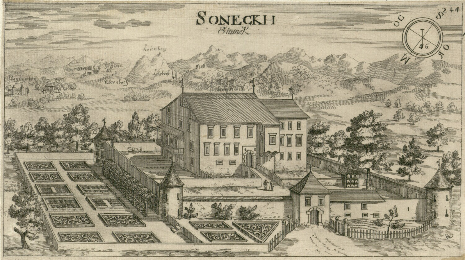 Grad Ig